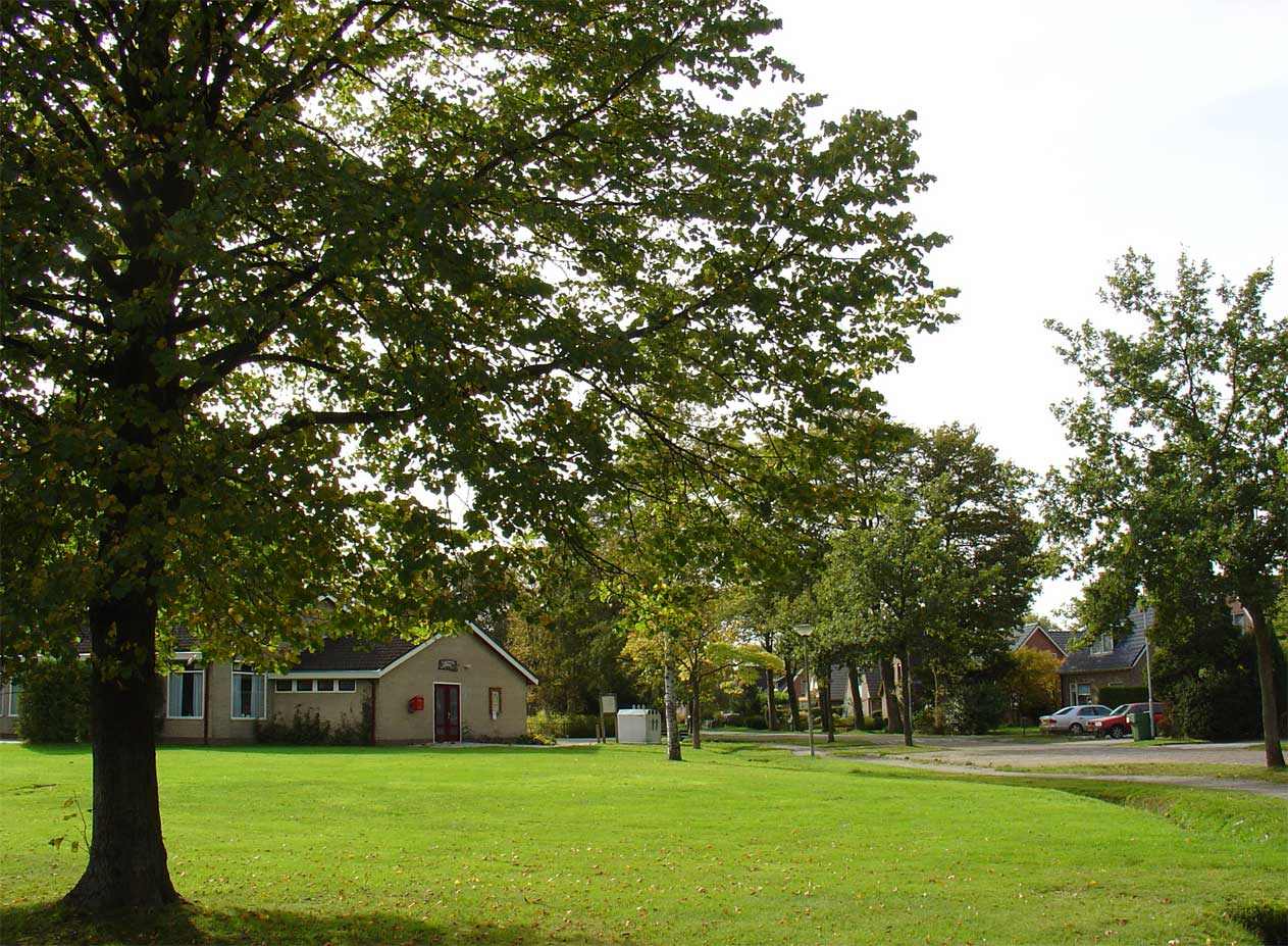 dorpsgezicht Altena in Drenthe